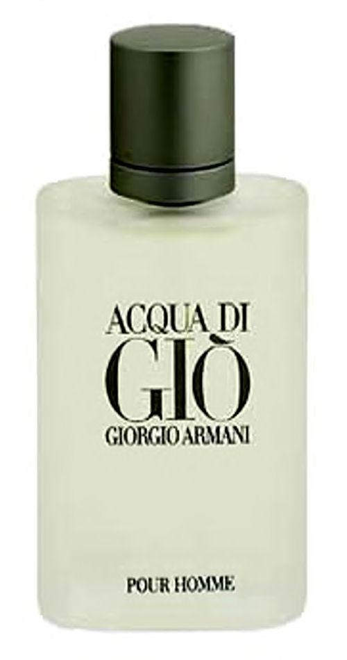 Acqua di Gio, Giorgio Armani pour homme. Cologne.